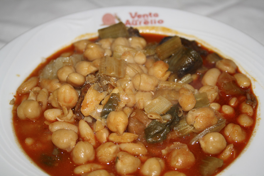 Berza con pringá. Foto realizada en Venta Aurelio. Restaurante en Chipiona. Cádiz